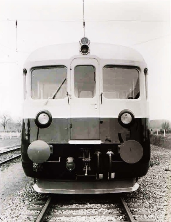 Stirnseite des BCFe 4/8 741 des Spiez-Erlenbach-Zweisimmen-Bahn (SEZ)